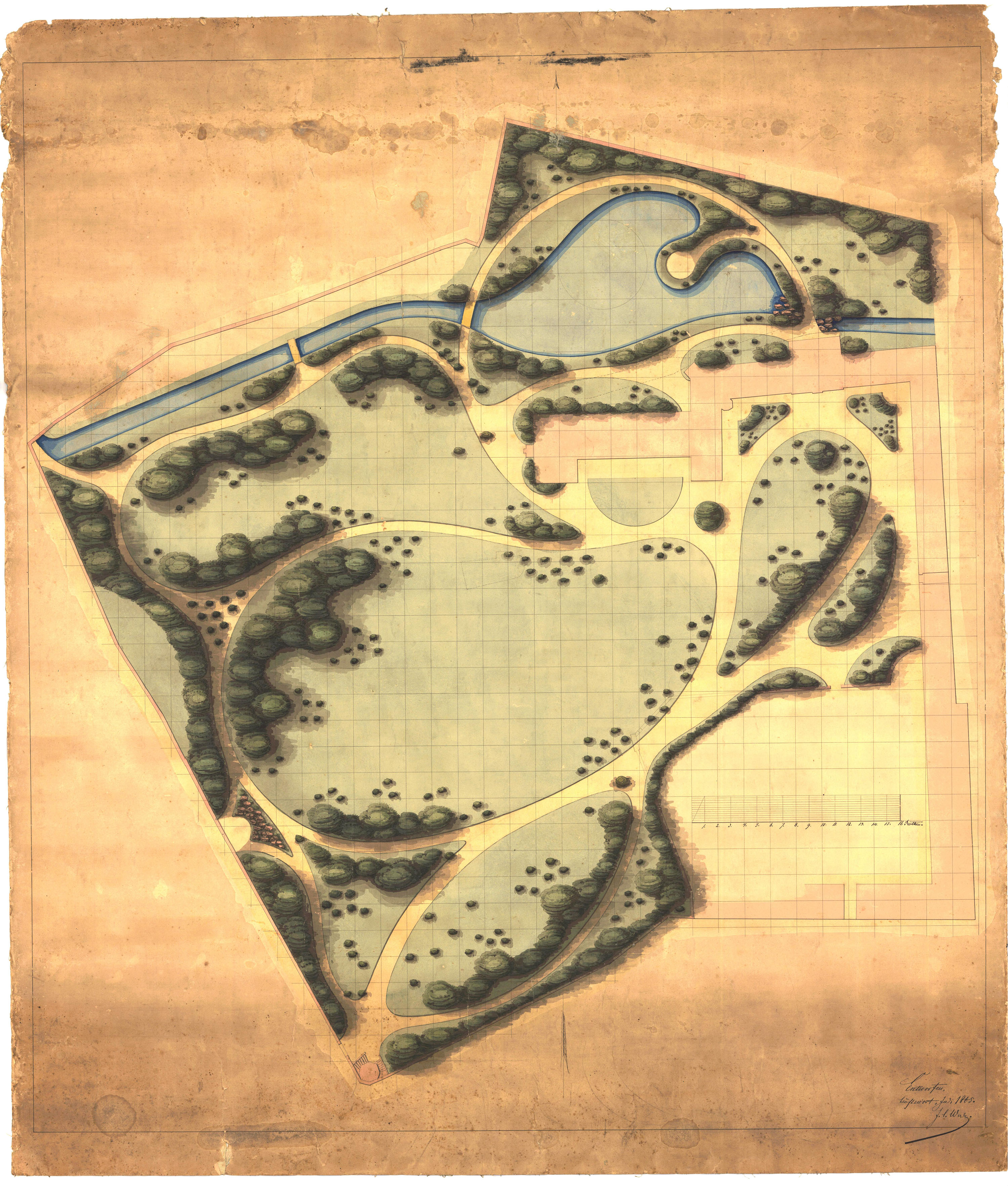 Gartenplan für Haus Meer von Joseph Clemens Weyhe aquarellierte Zeichnung auf Leinen aufgezogen, 112 * 126,5 cm